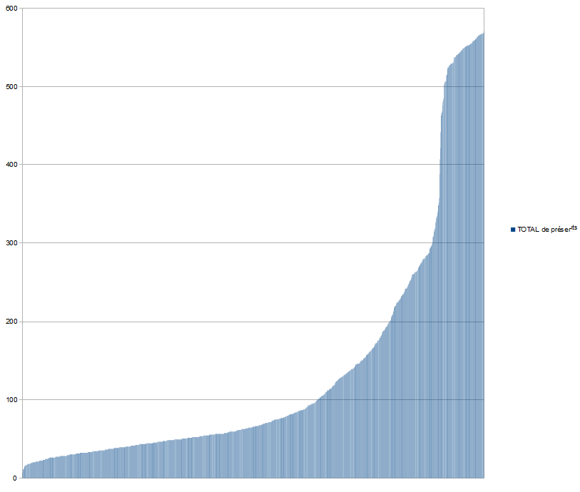 Ce graphe montre le nombre de présents lors de chaque scrutins (Il contient les 1246 premiers scrutins publics) en ordre de présents croissant.